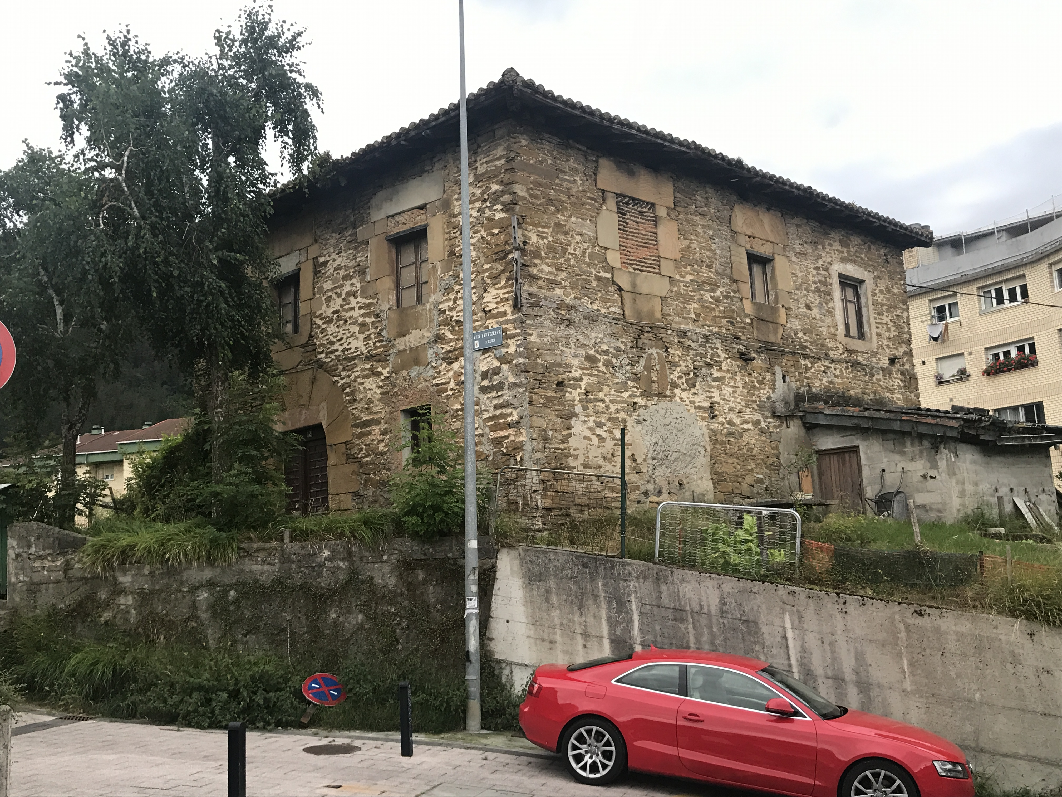 Casa-torre Katillangua, edificio medieval en la localidad de Eibar en Gipuzkoa, País Vasco (España). Casa-torre Katillangua edificio medieval construido entre los siglos XV y XVI. En su entorno se alzaba una ermita dedicada a San Lorenzo que databa de 1610 (la mandó construir María de Mallea) y se derribó en 1973 y un crucero de la misma época.